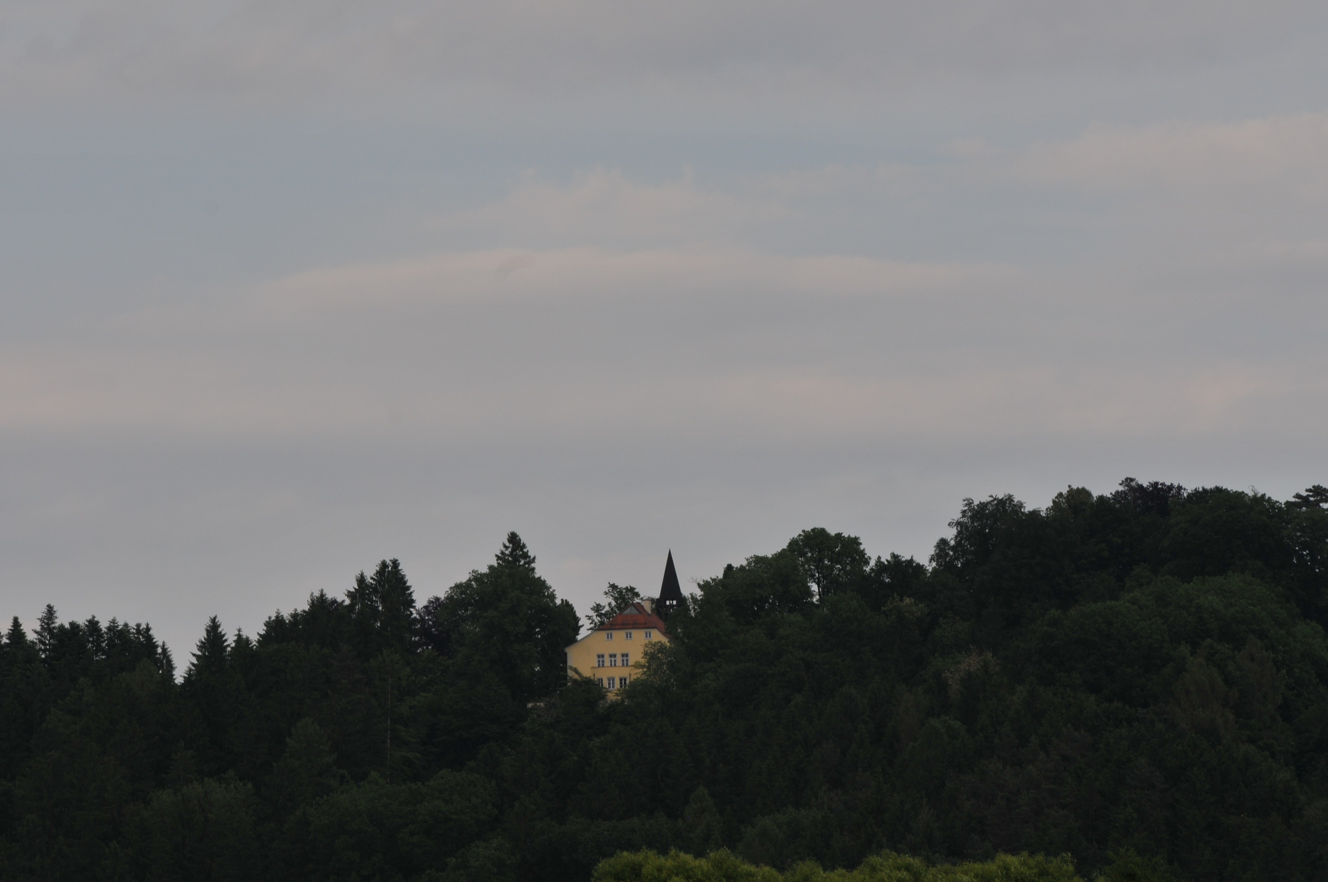 Schloss Vasoldsberg The making of this work was supported by Wikimedia Austria. For other files made with the support of Wikimedia Austria, please see the category Supported by Wikimedia Österreich.